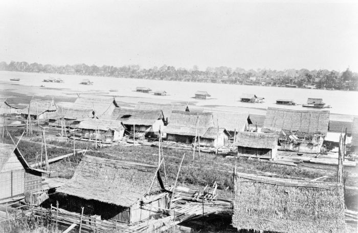 Foto. Deze foto is gemaakt tijdens de Sumatra Expeditie van 1877-1879. Landschappen en oudheden uit Djambi.. De Batang Hari rivier stroomt langs Djambi, in het district Rawas, Sumatra